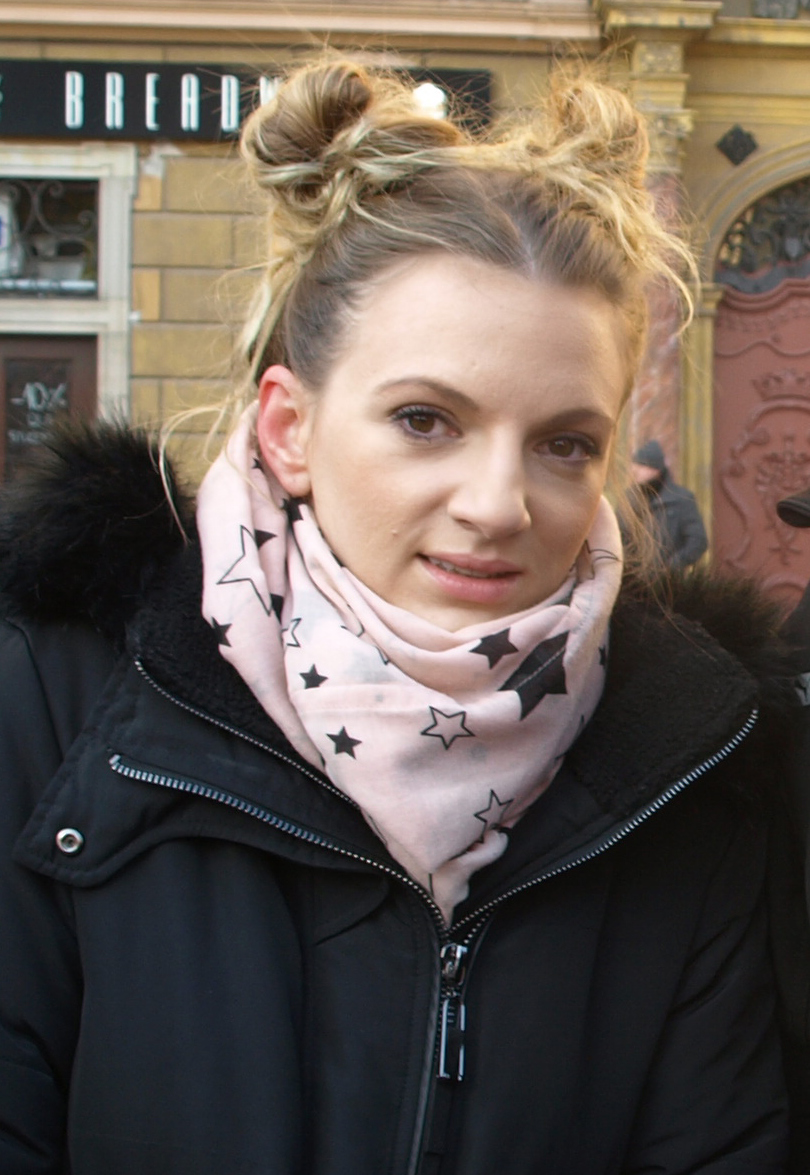 Polska piosenkarka Sarsa.